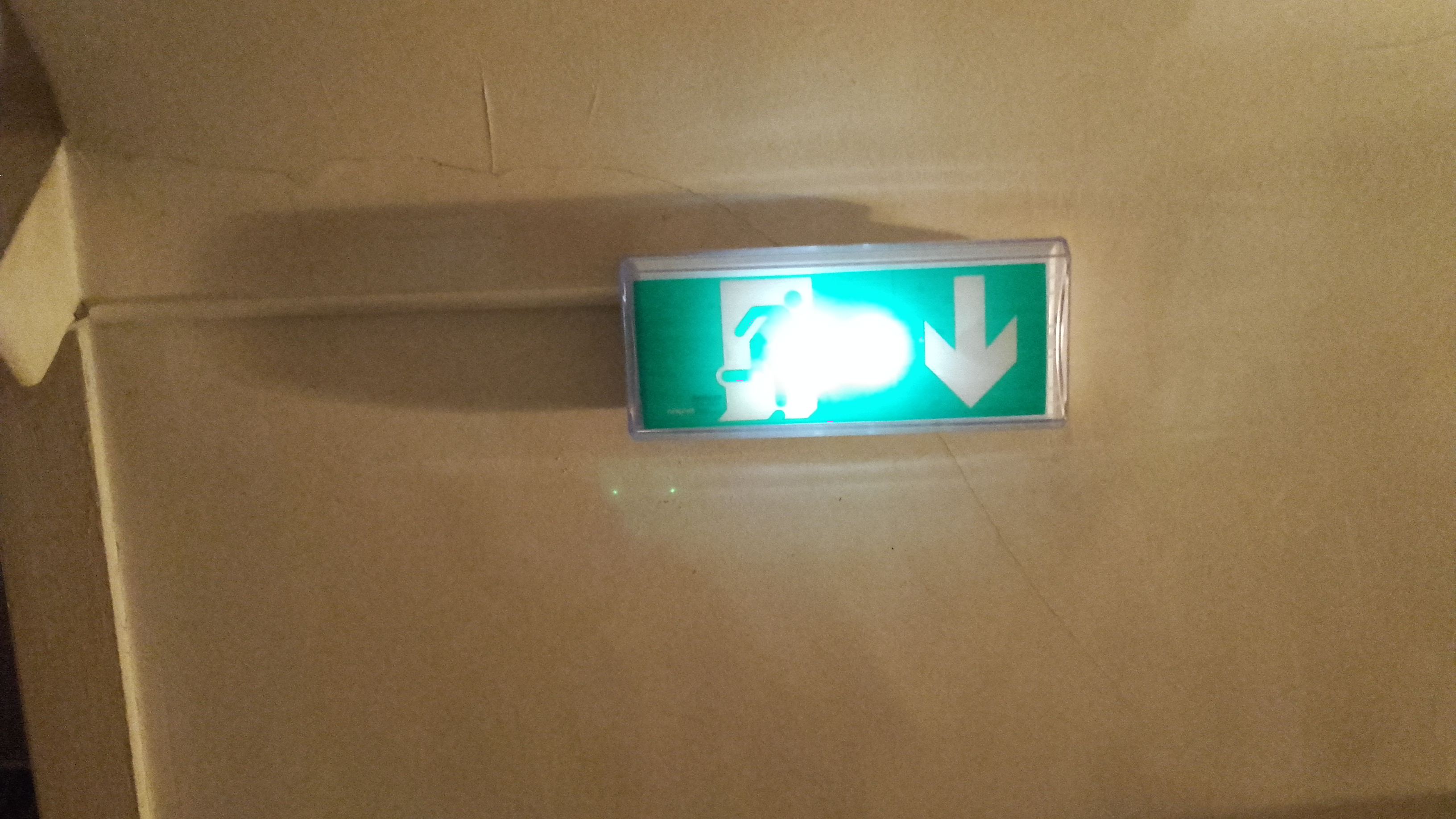 On voit ici un Bloc Autonome d’éclairage de sécurité de marque ZEMPER doté d'une sérigraphie flèche vers le bas